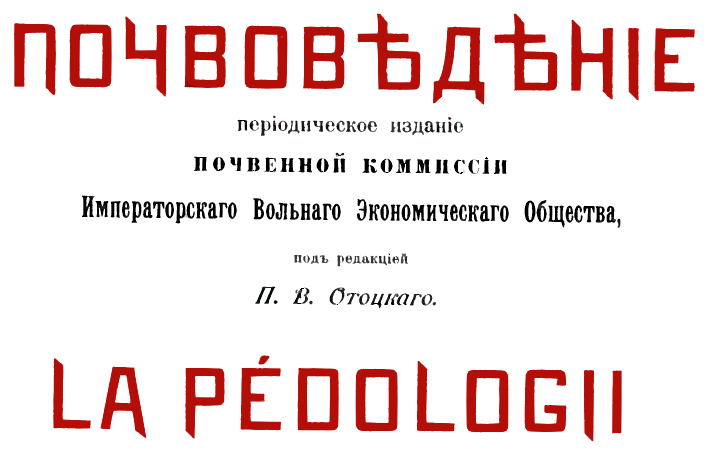 Обложка журналов "Почвоведение" начала 19 века.